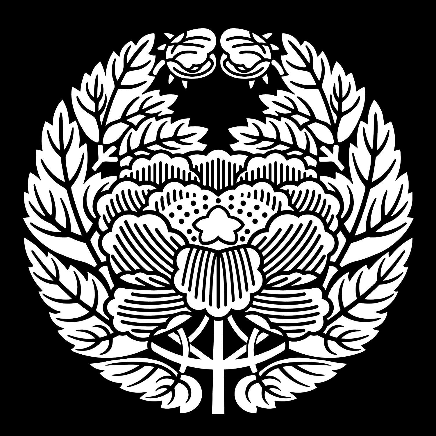 「近衛牡丹」紋（染抜）